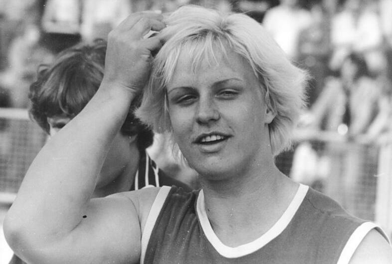 Ilona Slupianek ADN-ZB Kluge 17.07.1977-str-Potsdam: DDR-Rekord im Kugelstoßen durch Ilona Slupianek-Herausragende Leistung eines Leichtathletik-Sportfestes am 16.07. in Potsdam waren die 21,79 m im Kugelstoßen von Ilona Slupianek (SC Dynamo Berlin) . Die Olympiafünfte von Montreal verbesserte den DDR-Rekord ihrer Klubkameradin Marianne Adam um zwölf Zentimeter.